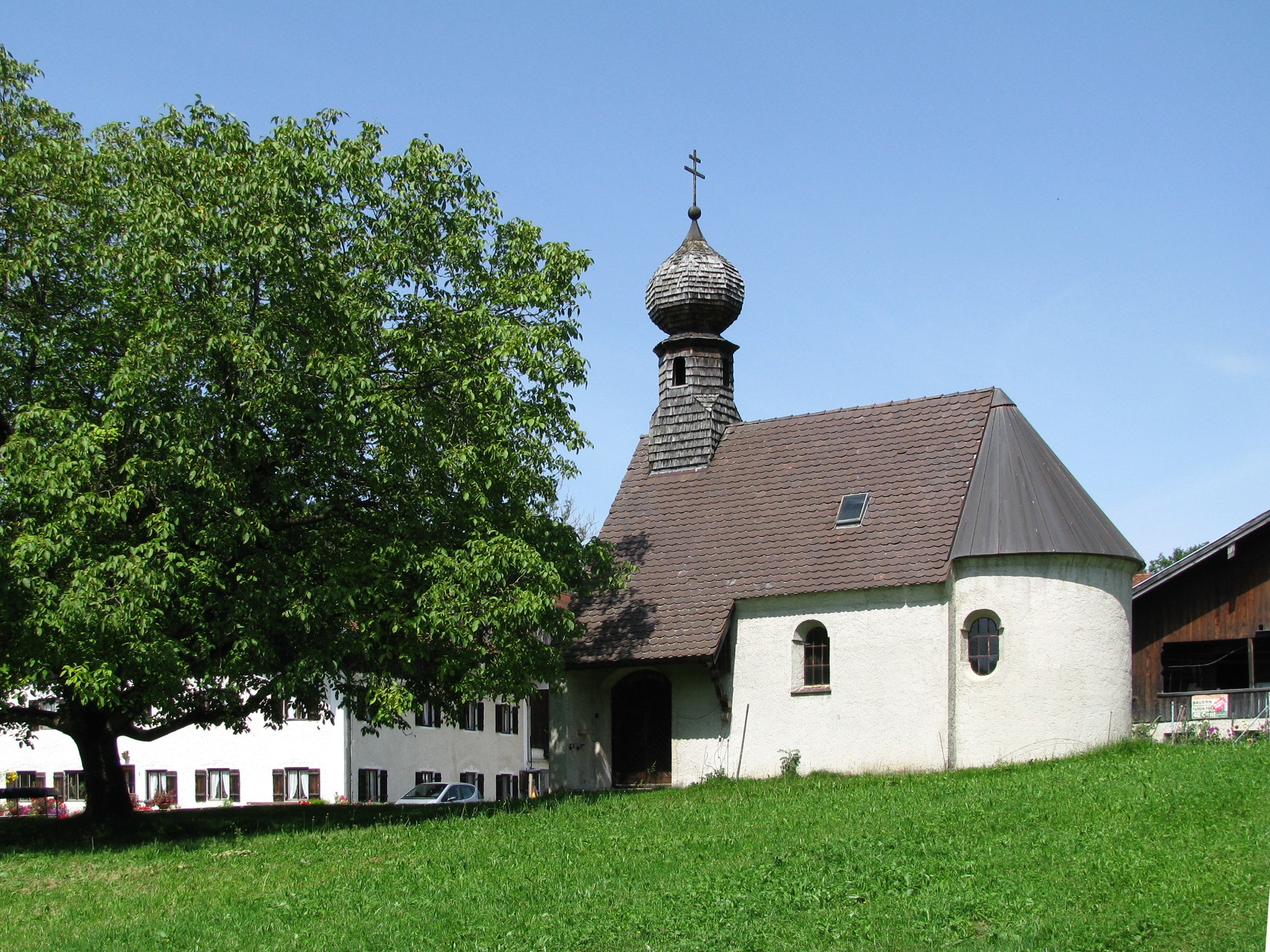 Kath. Weilerkapelle in Habichau, Gemeinde Dietramszell; historisierender Neubau mit Zwiebel-Dachreiter, 1958/59